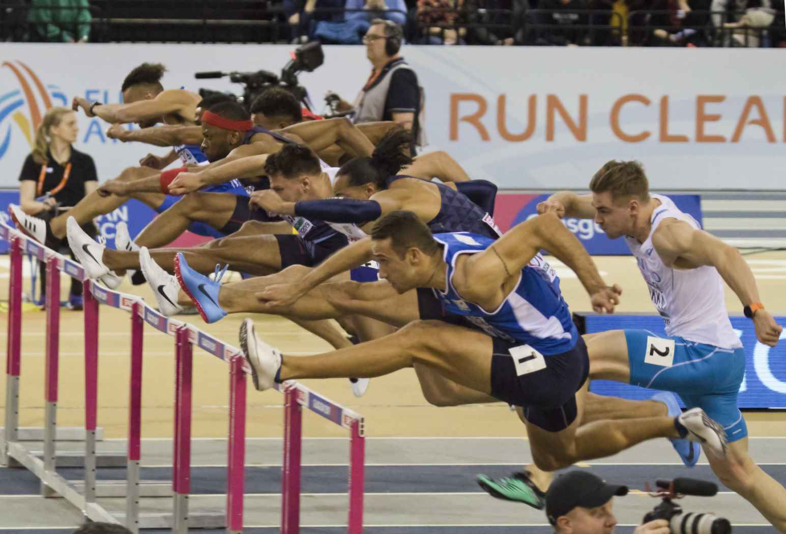 EKI30216 finale 60mH heren